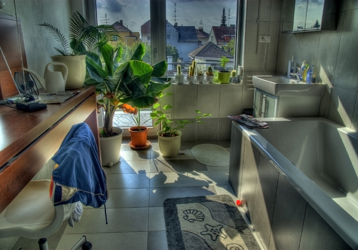 Věra Stuchelová´s photographs